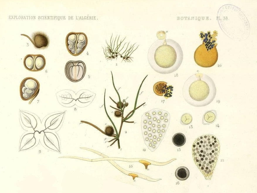 Dessin de Pilularia minuta